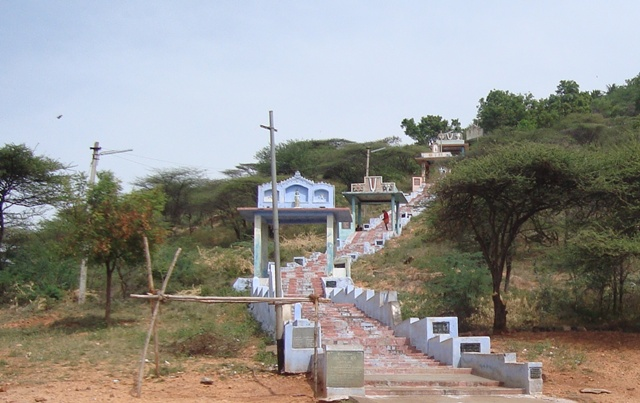 சென்றாயப் பெருமாள் கோயிலுக்கான மலைப்பாதை